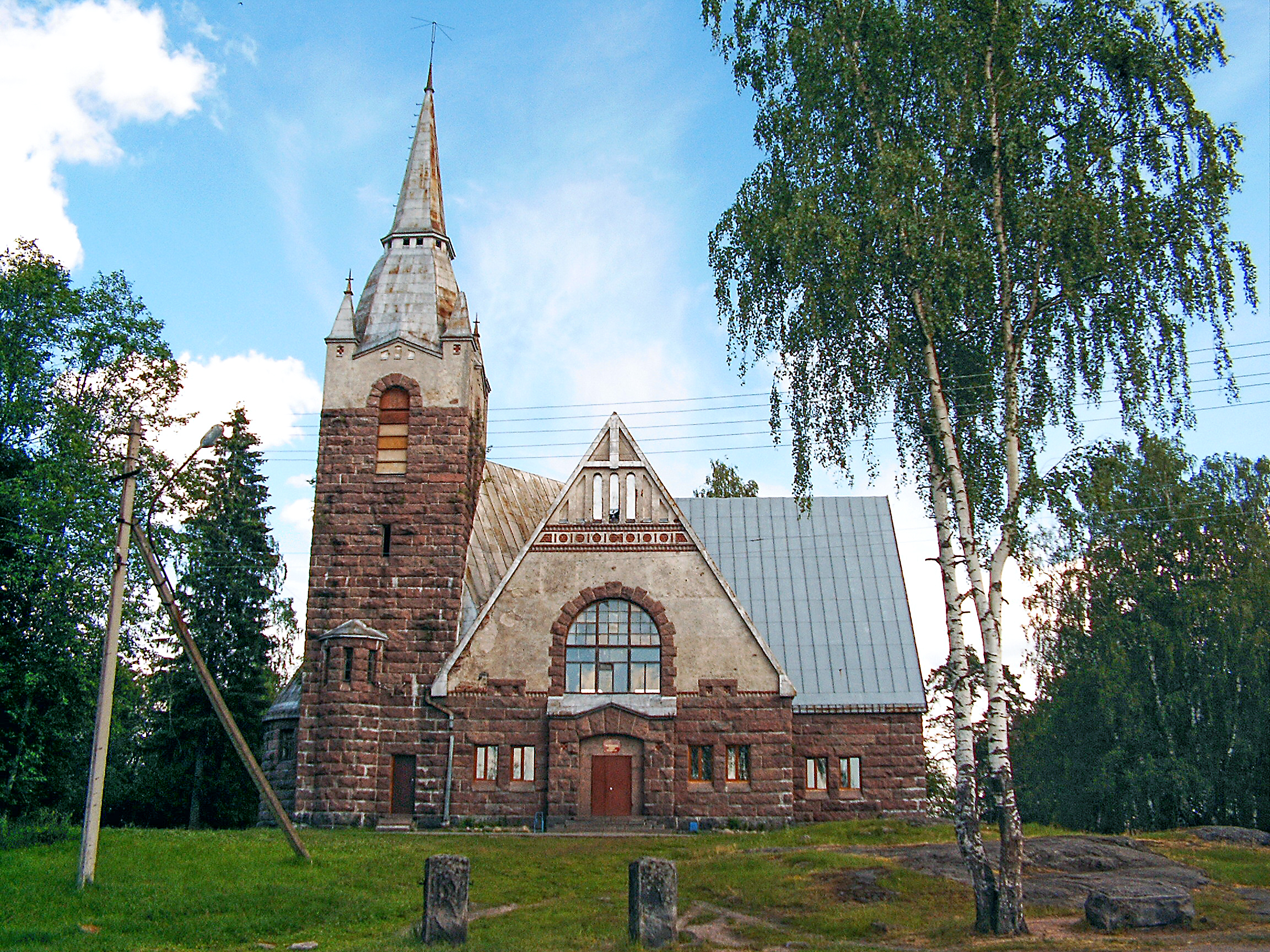 Кирха в посёлке Мельниково (Räisälä) Приозерского района Ленинградской области. Построена в 1912 году, по проекту финского архитектора Йозефа Стенбека.